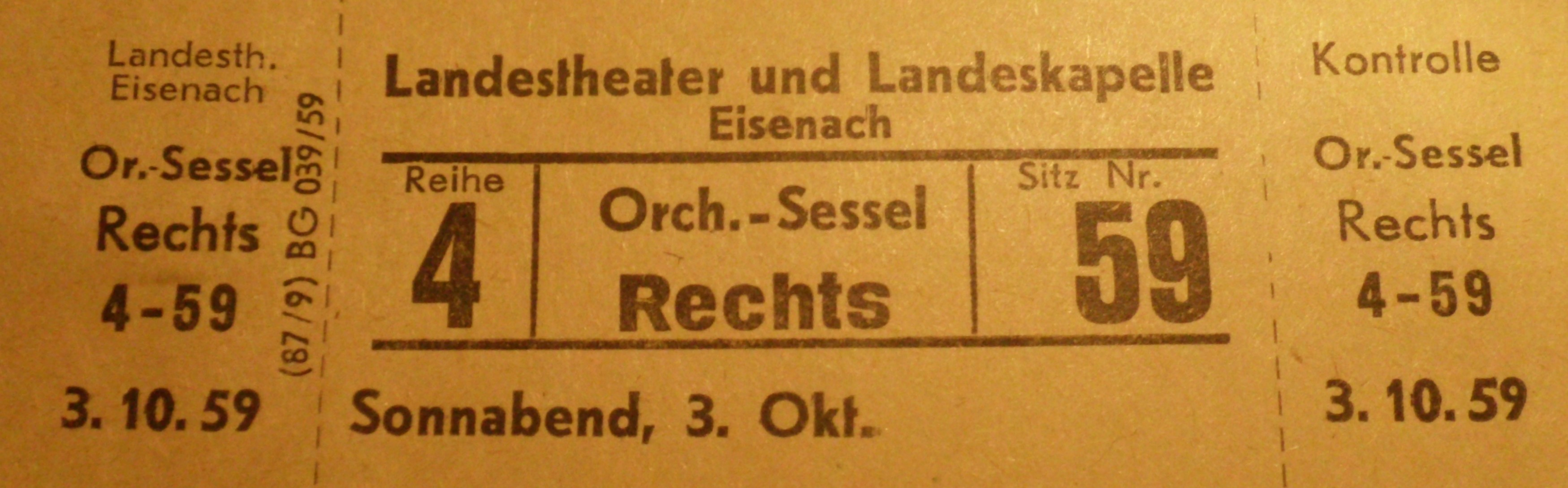 Eintrittskarte des Landestheater Eisenach vom 03.10.1959